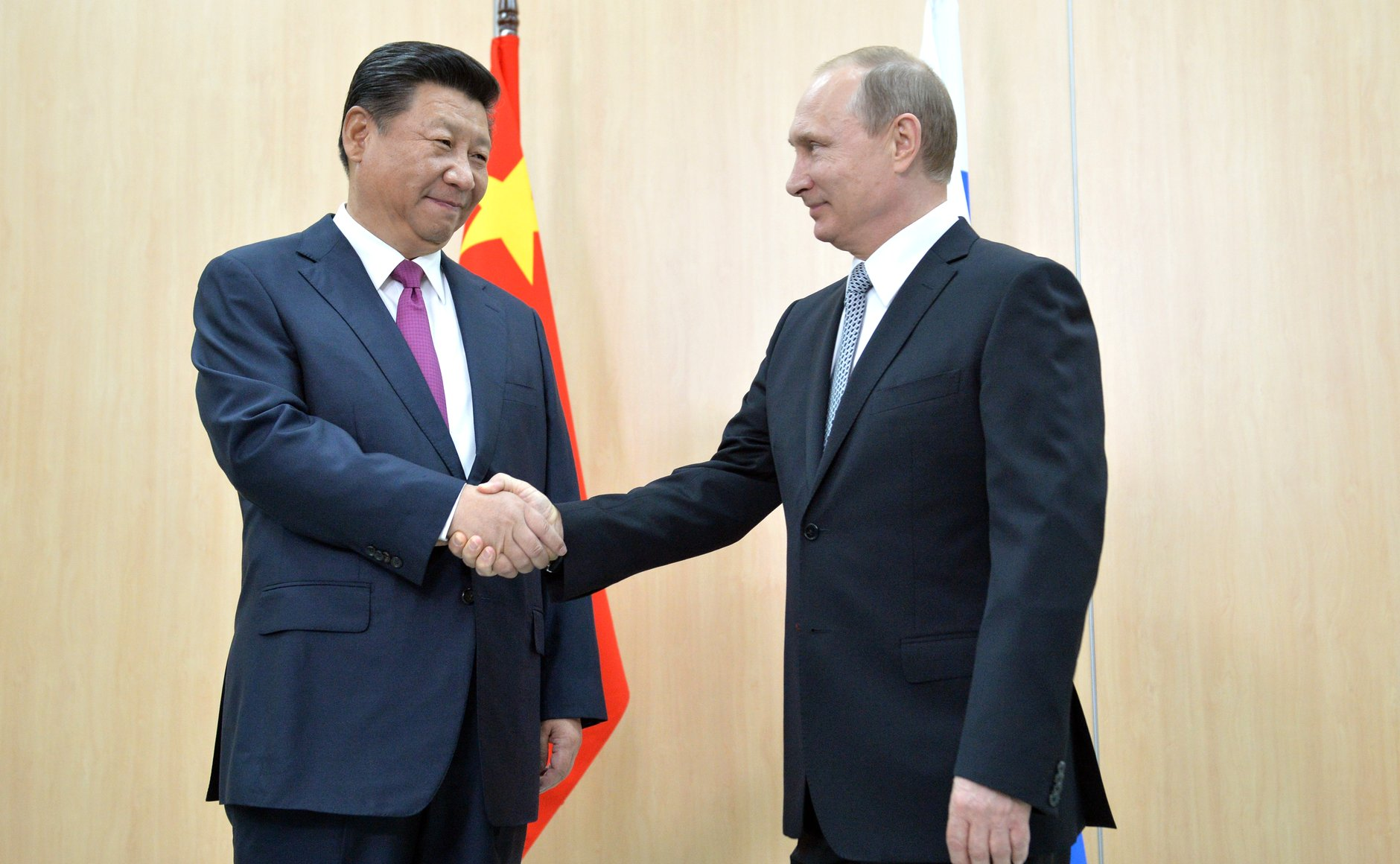 Встреча Президента России Владимира Путина с Председателем КНР Си Цзиньпином